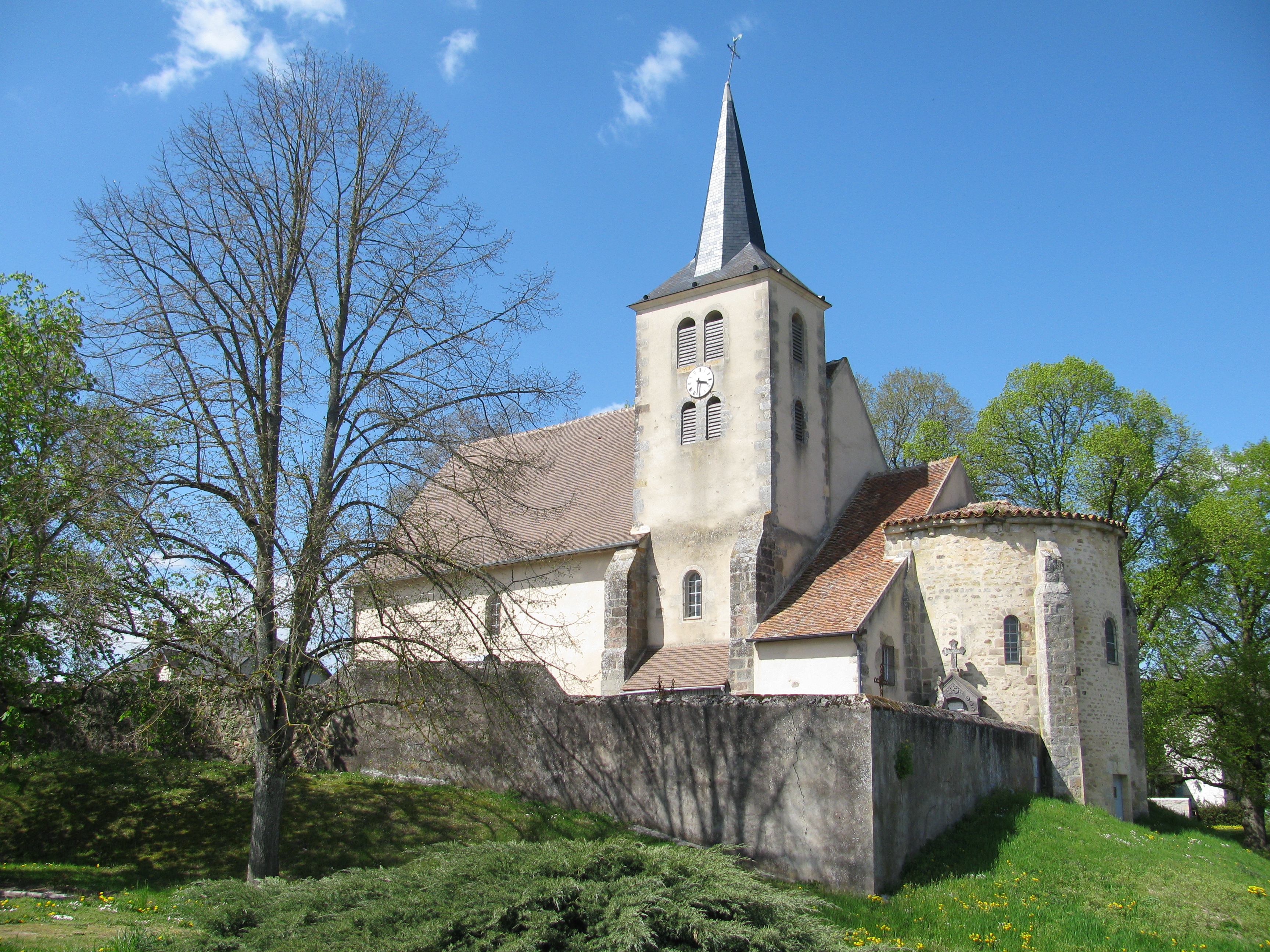 Église Saint-Pierre d'Avril-sur-Loire, Nièvre, France.